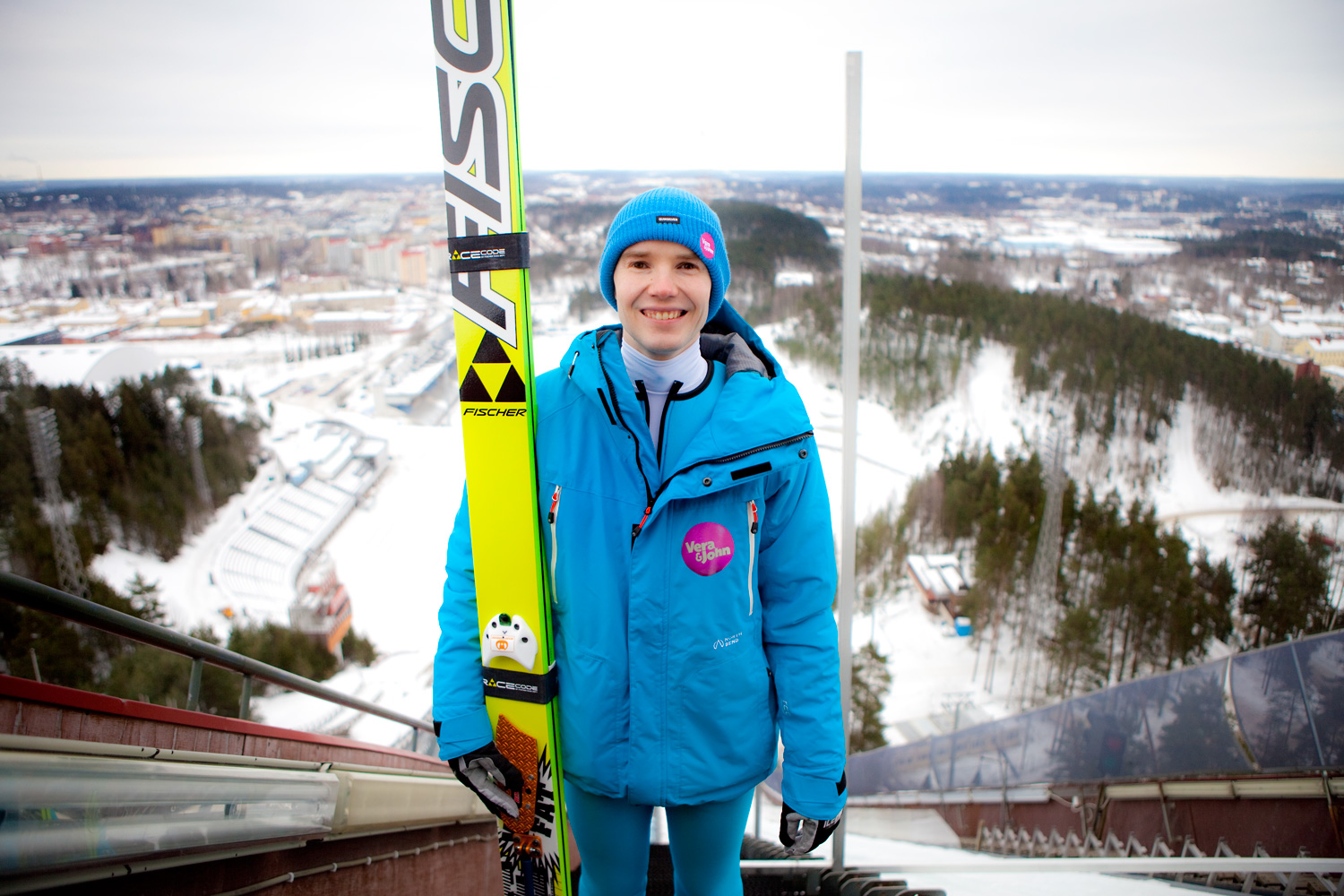 Harri Olli Lahden hyppyrimäen tornissa helmikuussa 2015